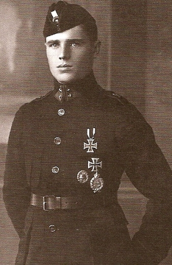 Friz Schulz